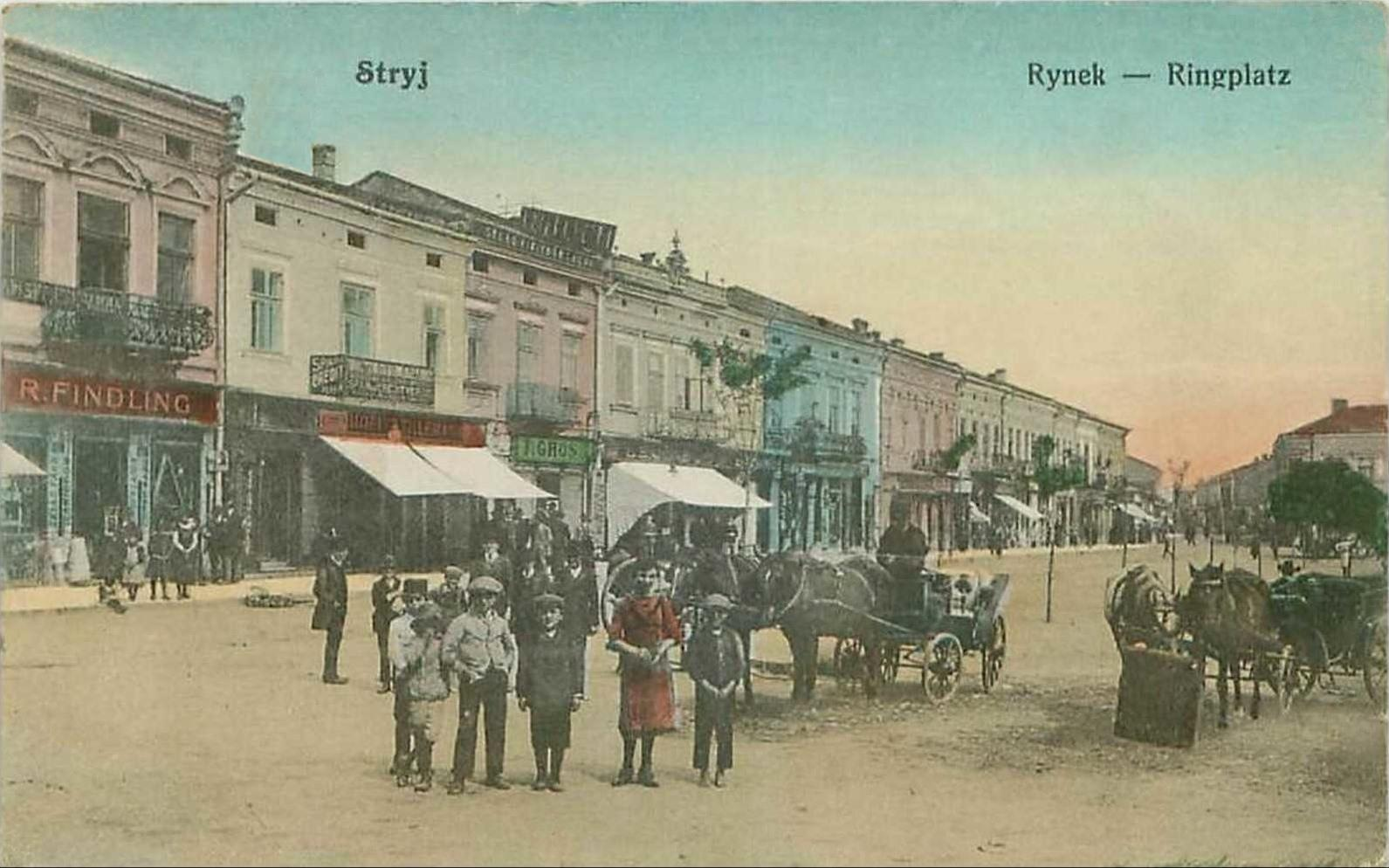 Pohľadnica mesta Stryj z roku 1915.